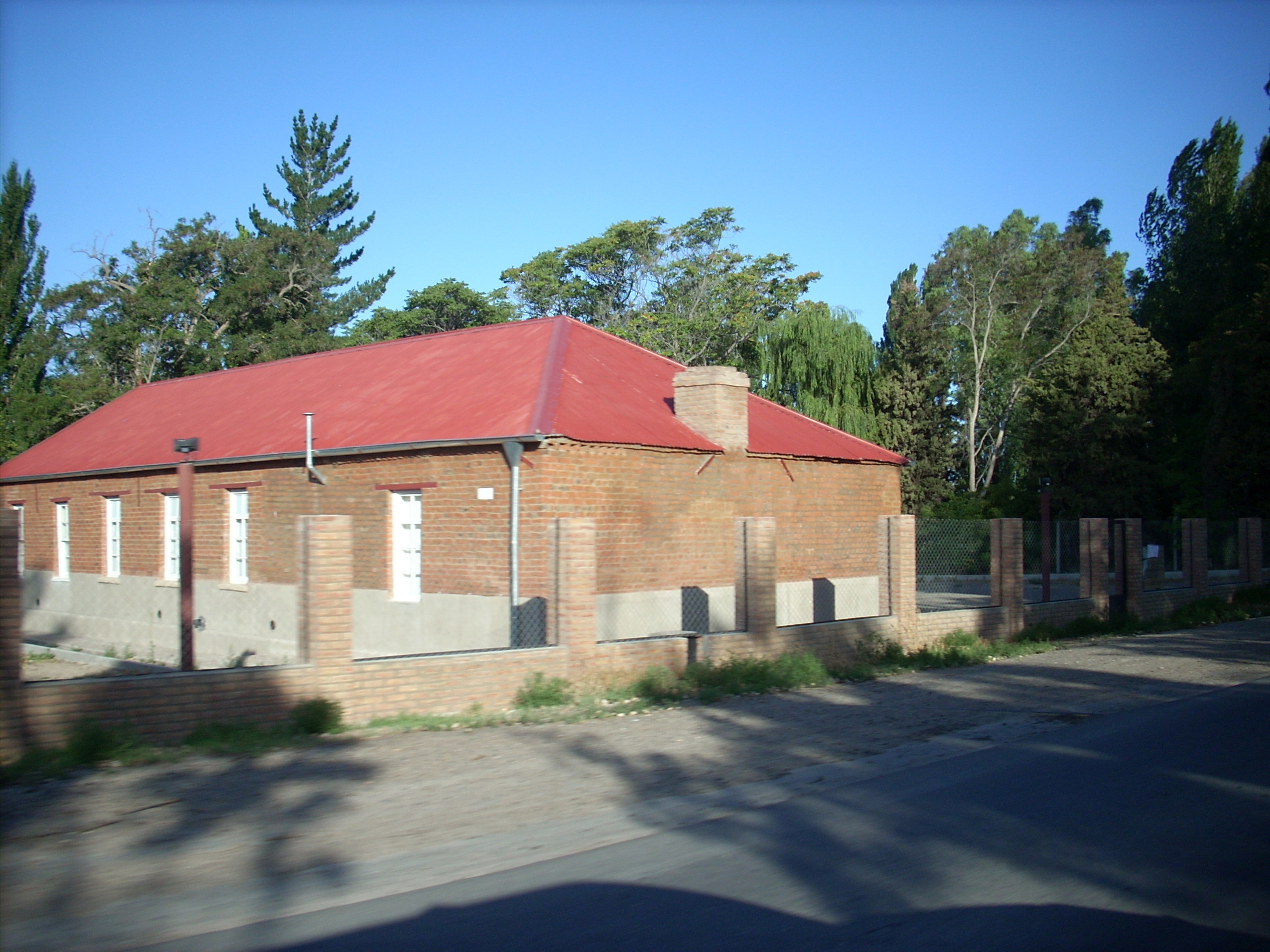 Vista de la Capilla Seion ubicada en Bryn Gwyn. La foto salió movida, porque estaba en la camioneta.